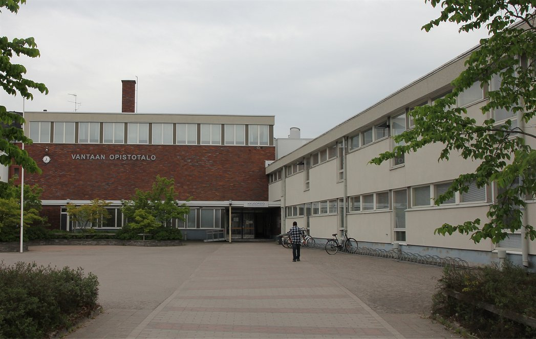 Vantaan aikuisopiston Opistotalo. Vantaan aikuisopisto on yksi Suomen suurimmista kansalaisopistoista.